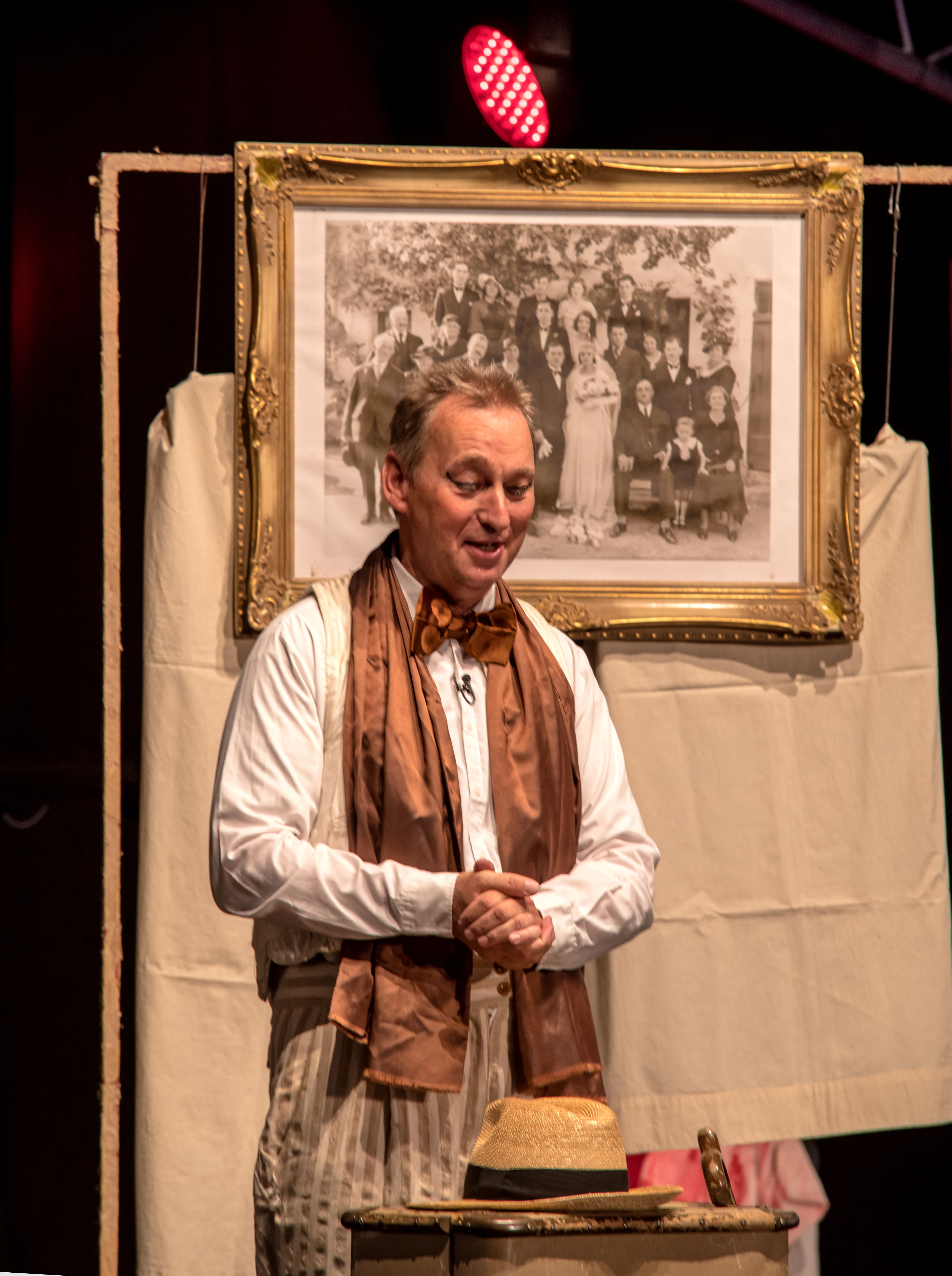 Bilder vom Zelt Musik Festival 2016 in Freiburg im Breisgau Der Schauspieler Bernd Lafrenz und der Musikverein Sölden "Sommernachtstraum"